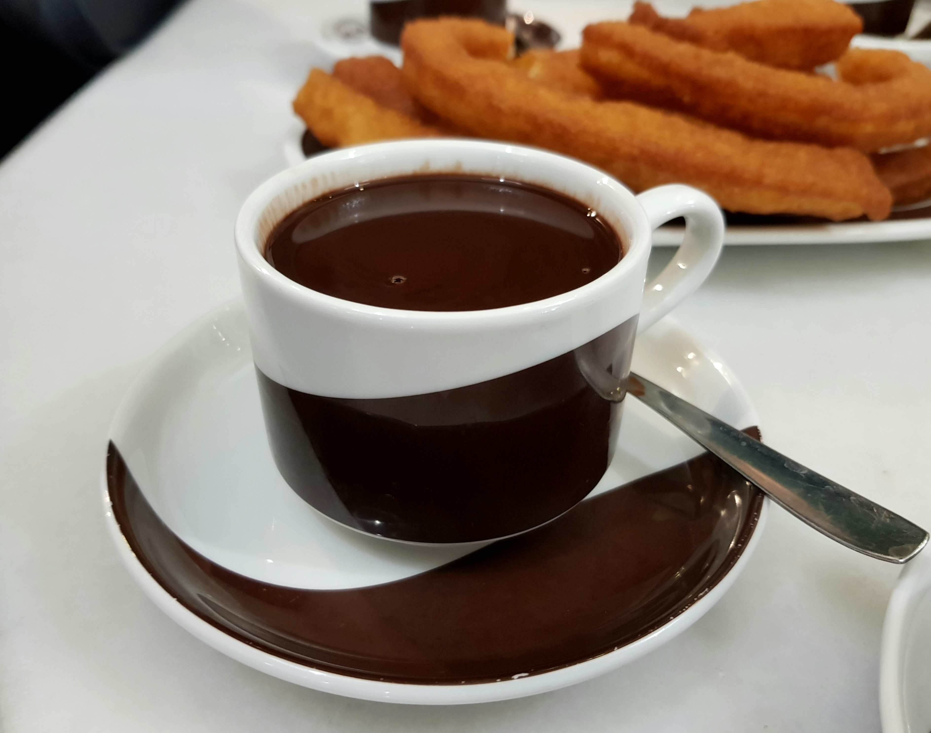 Xocolate a un restaurant de Dénia.